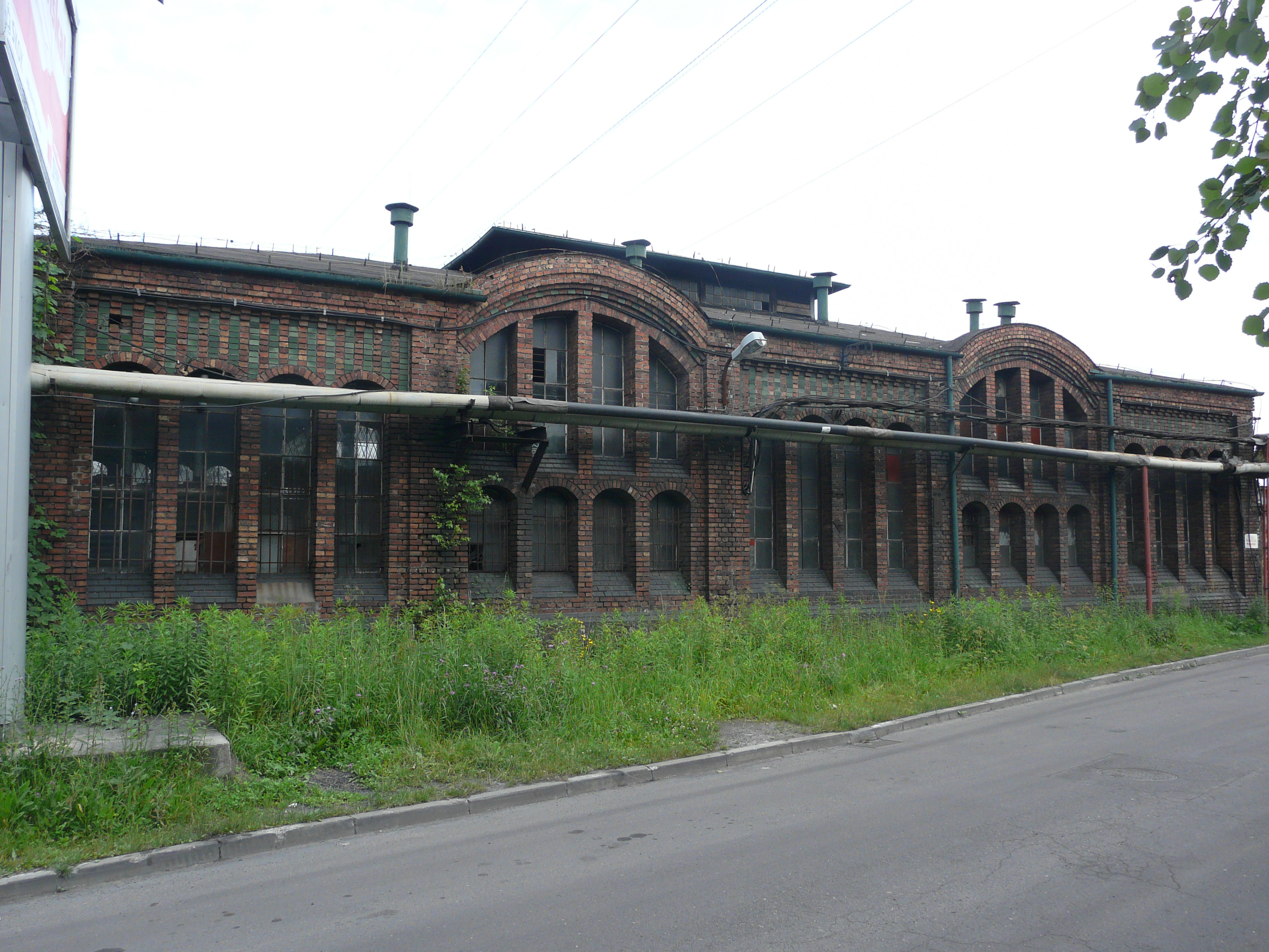 Wieczorek Coal Mine